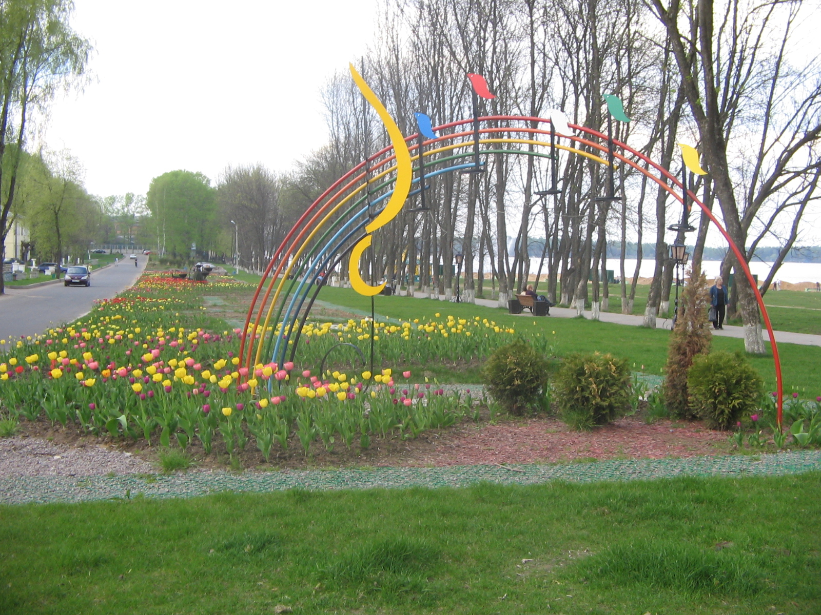 Набережная Солнечногорска